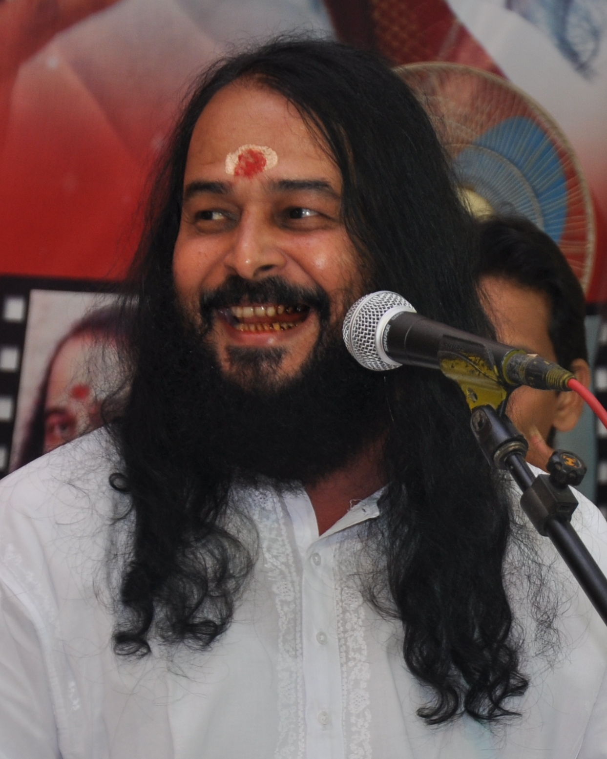 Thrikodithanam sachidanandan ,singer,Kerala